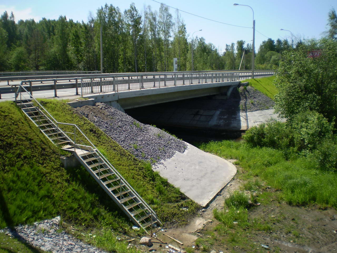 7-й км автодороги А128 (Дорога жизни). Мост через р. Лубью.